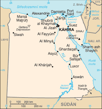 Mapa Egypta - přeložená mapa z CIA World Factbook.